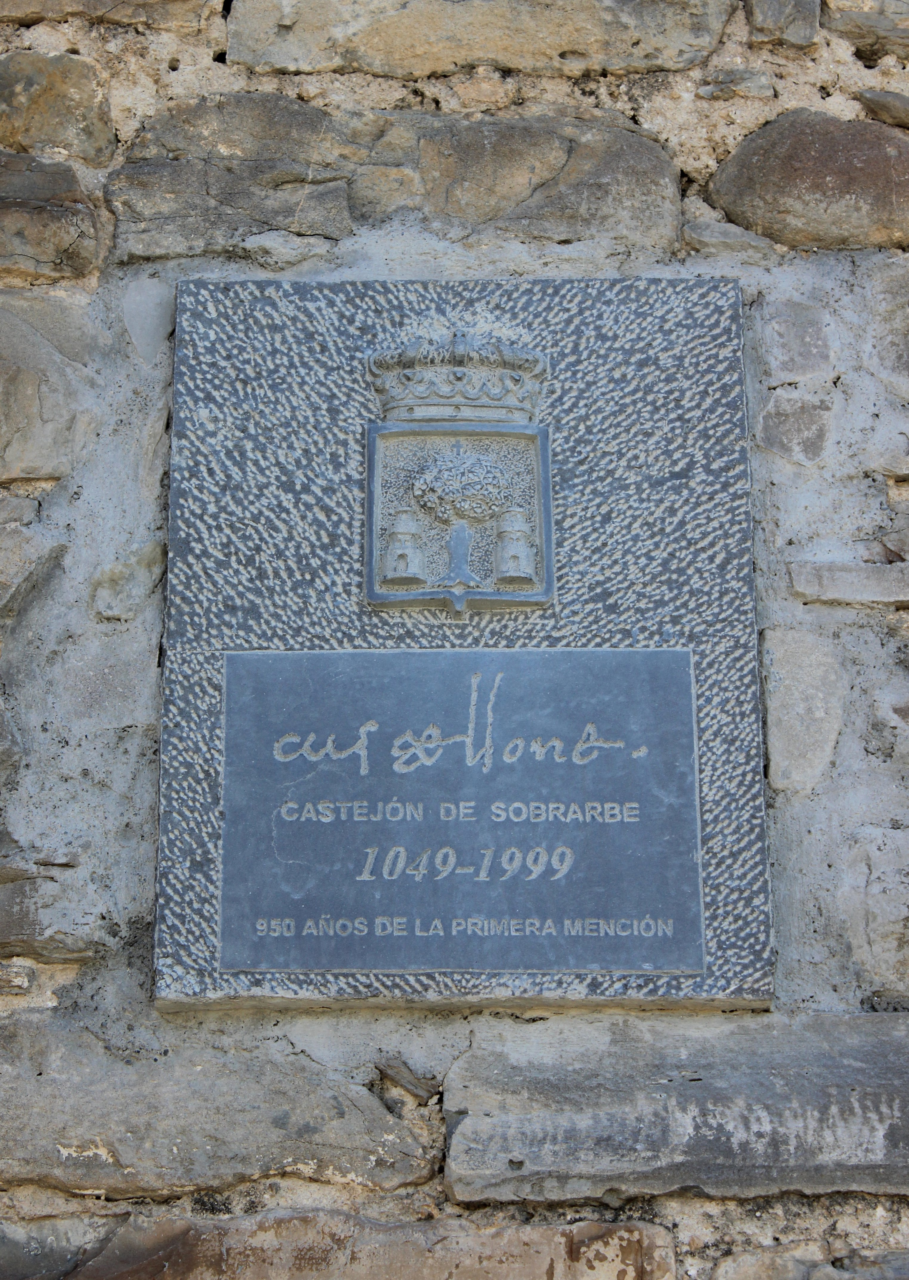 Aragonés: Placa conmemorativa d'o 950 cabo d'anyo d'a primer mención documentada de Castillón de Sobrarbe.